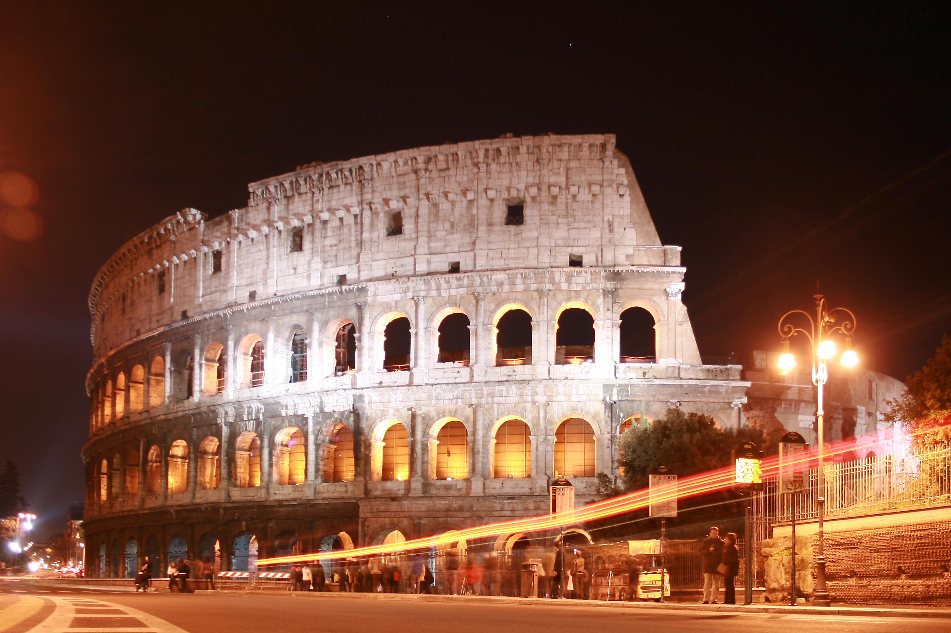 Kolosseum in Rom, fotografiert kurz nach Eintritt der Dämmerung